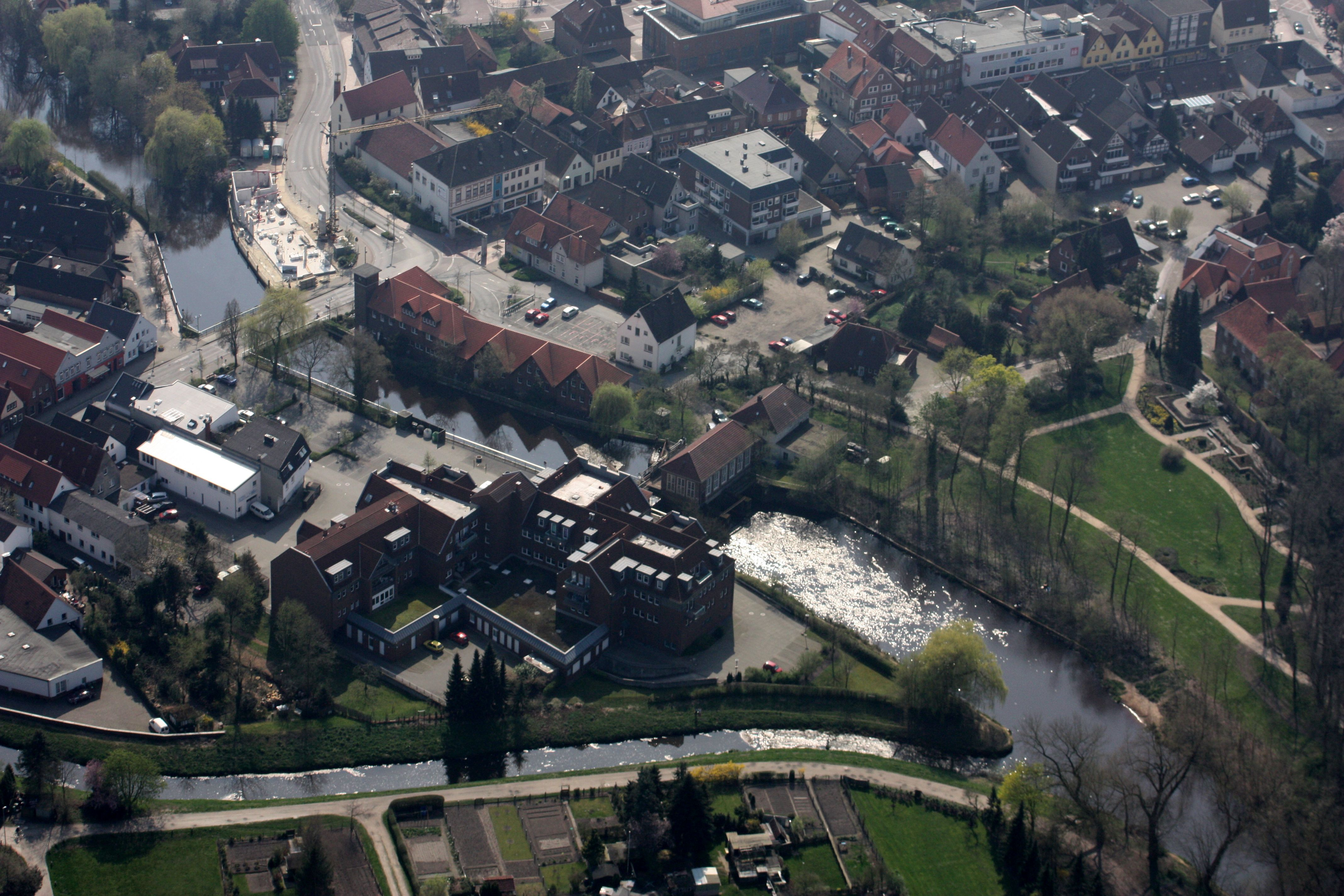 Deutschland, Niedersachsen, Wildeshausen Zentrum, Frühjahr 2009. Geradliniger Überflug über Wildeshausen in 1000 m Flughöhe von West nach Ost - über die beiden Seen im Westen, das Krandelstadion, die Alexanderkirche usw. Das Stadtzentrum liegt auf der rechten Seite des Flugzeuges. Blickrichtung rechts zum Flugzeug raus -also Blickrichtung nach Ost, Südosten und Süden